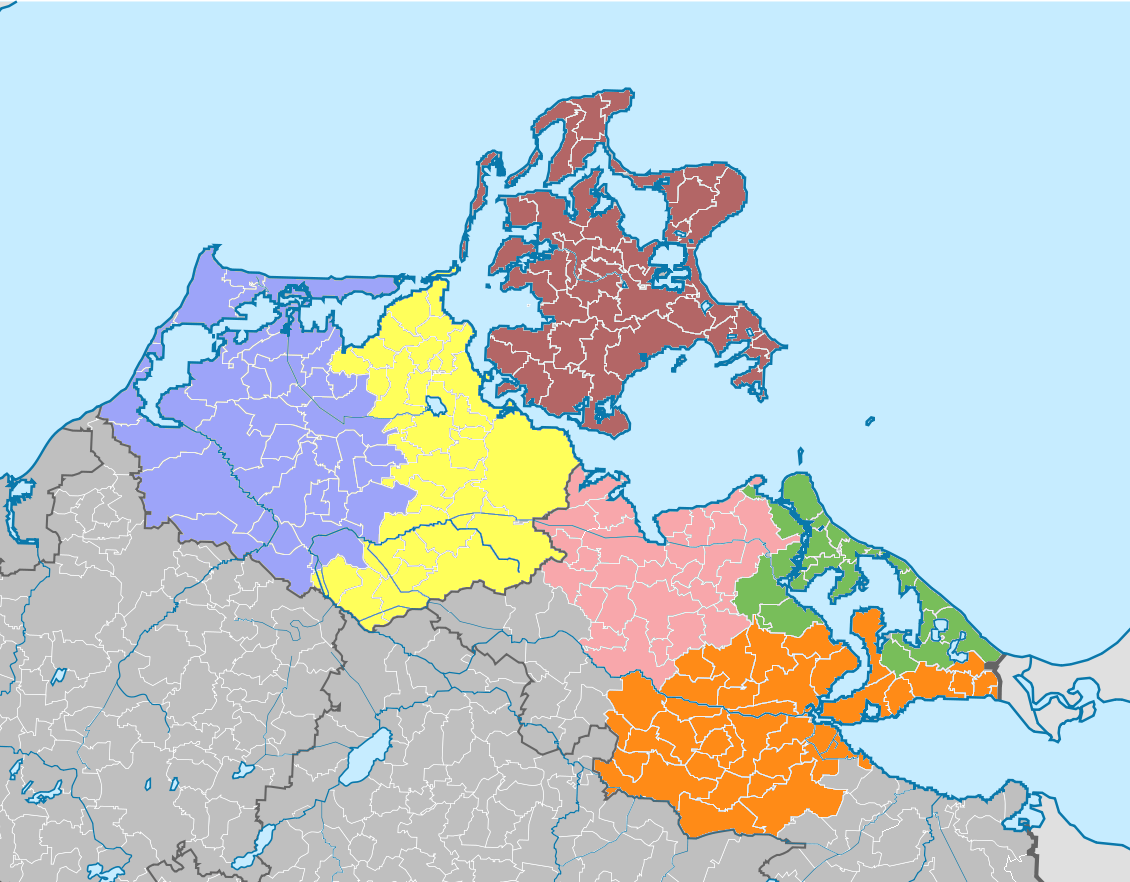 Karte der Amtsgerichtsbezirke im Landgerichtsbezirk Stralsund vor der am 6. Oktober 2014 in Kraft getretenen Gerichtsstrukturreform Amtsgericht Ribnitz-Damgarten Amtsgericht Stralsund Amtsgericht Bergen auf Rügen Amtsgericht Greifswald Amtsgericht Anklam Amtsgericht Wolgast